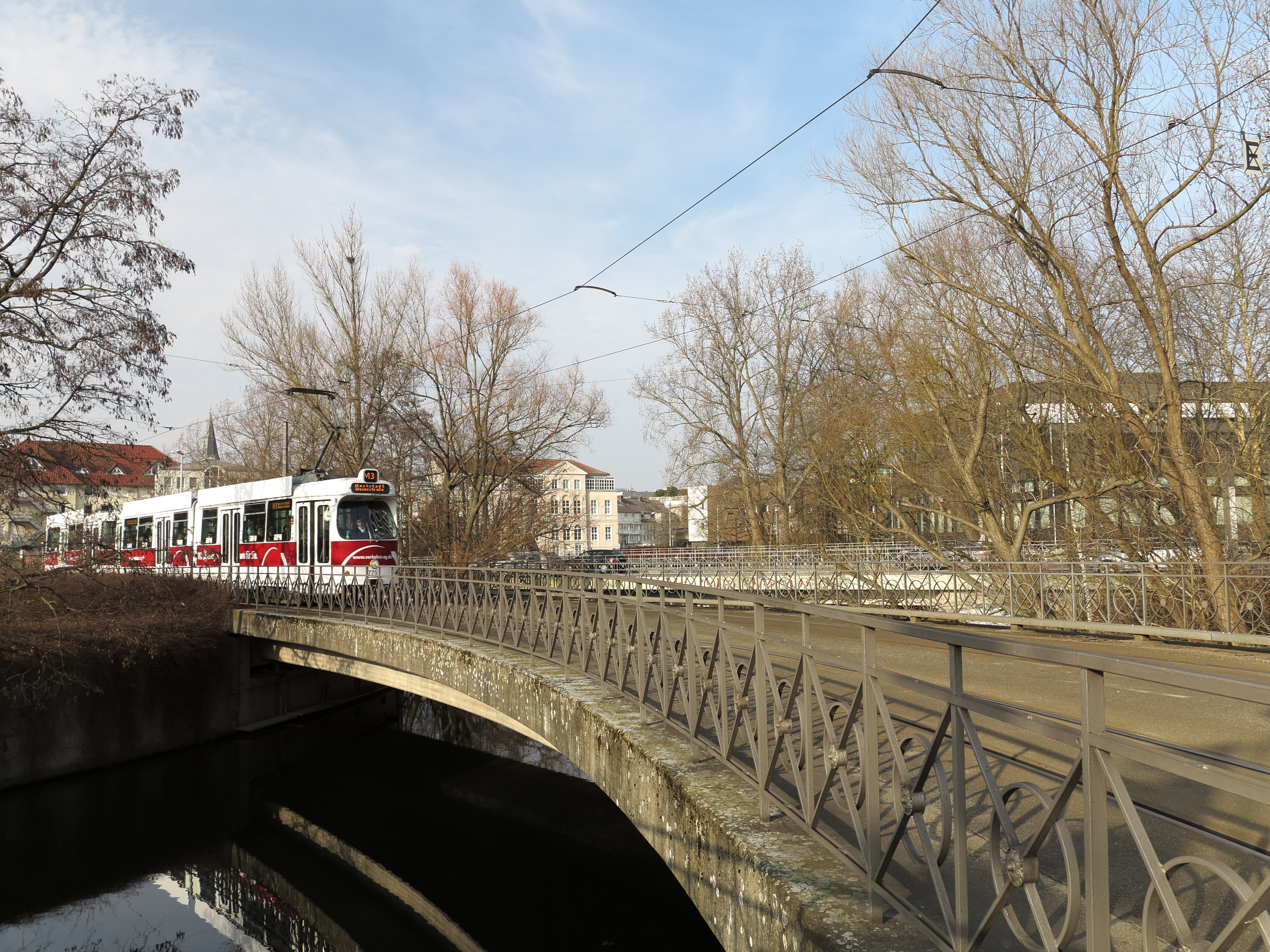 Die Stadtbahnbrücke der Gieselerbrücken am braunschweiger Europaplatz